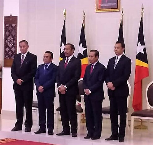 Vereidigung von Filomeno Paixão (Mitte) als Verteidigungsminister Osttimors. Rechts Premierminister Taur Matan Ruak, links Präsident Francisco Guterres. Am rechten Rand, der oberste Richter Deolindo dos Santos. Ganz links unbekannt.